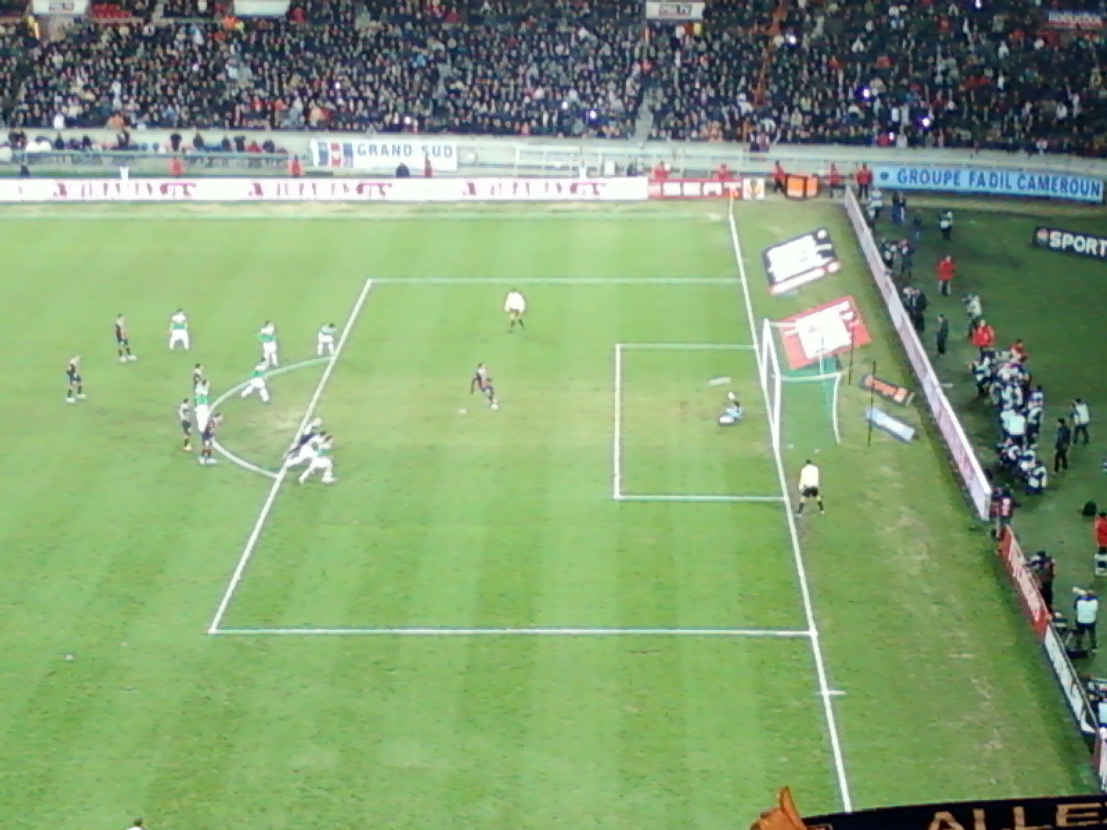 Penalty de Guillaume Hoarau (4-2) lors du match Paris SG - Athletic Bilbao du 14 décembre 2011 au Parc des Princes.